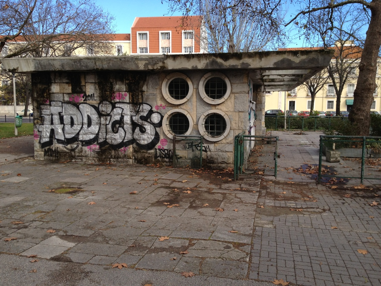 Fachada poente do Edificio de Apoio dos equipamentos desportivos do Jardim do Campo Grande em 2012.